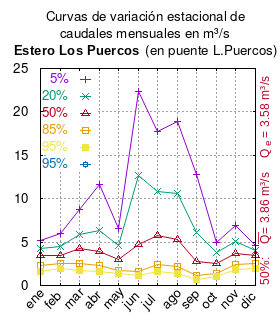 Curvas de variación estacional del estero Los Puercos en puente Los Puercos. # Dirección General de Aguas # Modelación hidrogeológica de la cuenca del Estero Los Puercos, Región del Maule. # Santiago de Chile # Ministerio de Obras Públicas (Chile) # 2013 # url: # urlarchivo: # Figura III-7. Curva de variación estacional de caudales promedios mensuales en estero Los Puercos en puente Los Puercos, p.32 mes 5% 20% 50% 85% 95% ene 5.215 4.257 3.404 2.338 1.594 feb 6.015 4.494 3.469 2.511 2.005 mar 8.722 5.846 4.282 2.590 1.757 abr 11.580 6.303 3.873 2.253 1.577 may 6.619 4.604 3.039 1.784 1.333 jun 22.388 12.682 4.731 1.580 1.136 jul 17.748 10.809 5.811 2.385 1.597 ago 18.937 10.544 5.321 2.242 1.379 sep 12.828 6.142 2.764 1.129 0.719 oct 4.898 3.828 2.516 1.358 1.064 nov 6.929 5.076 3.647 2.378 1.802 dic 4.627 4.087 3.504 2.561 1.933